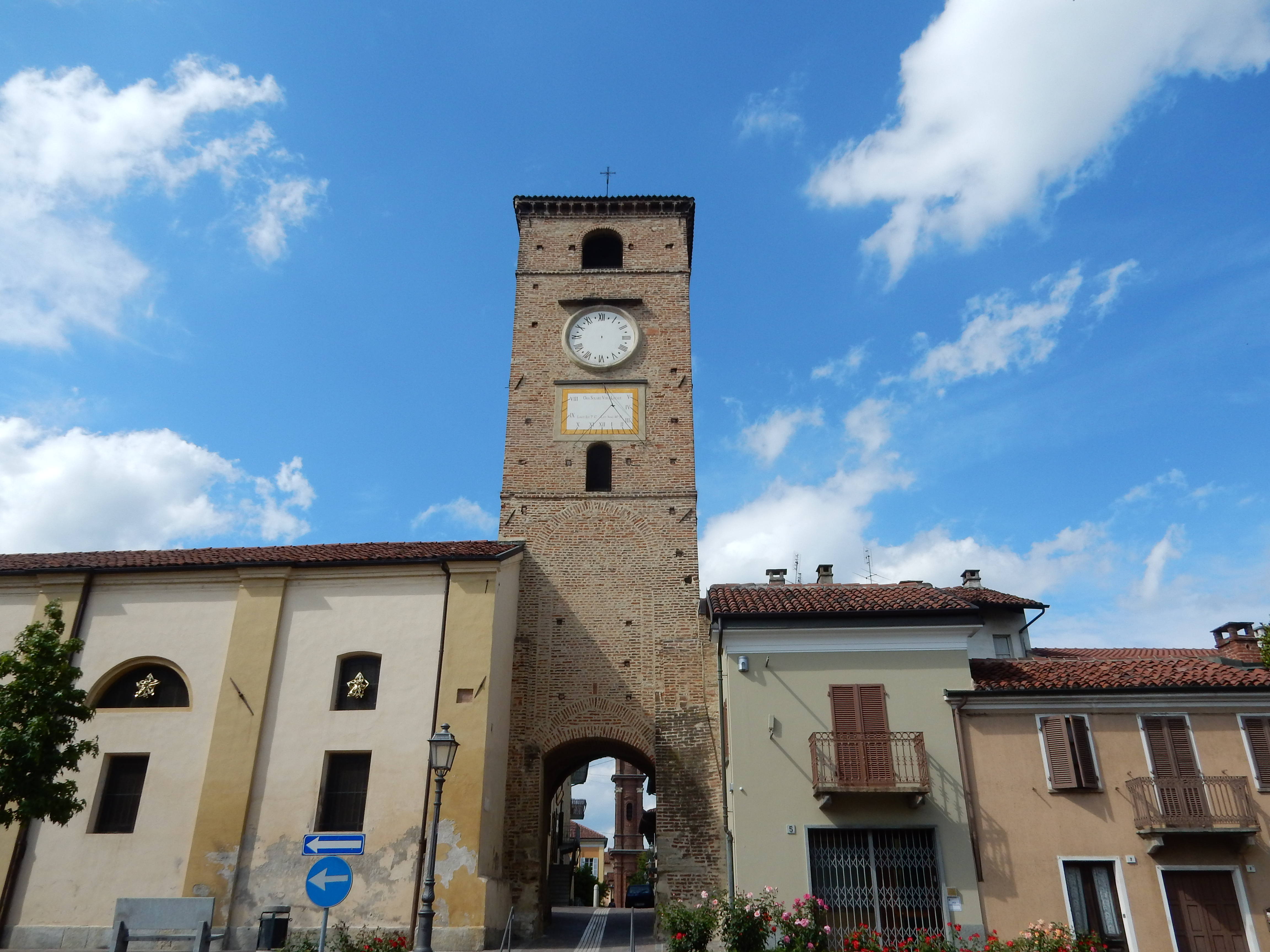 Porta - torre di accesso al centro storico